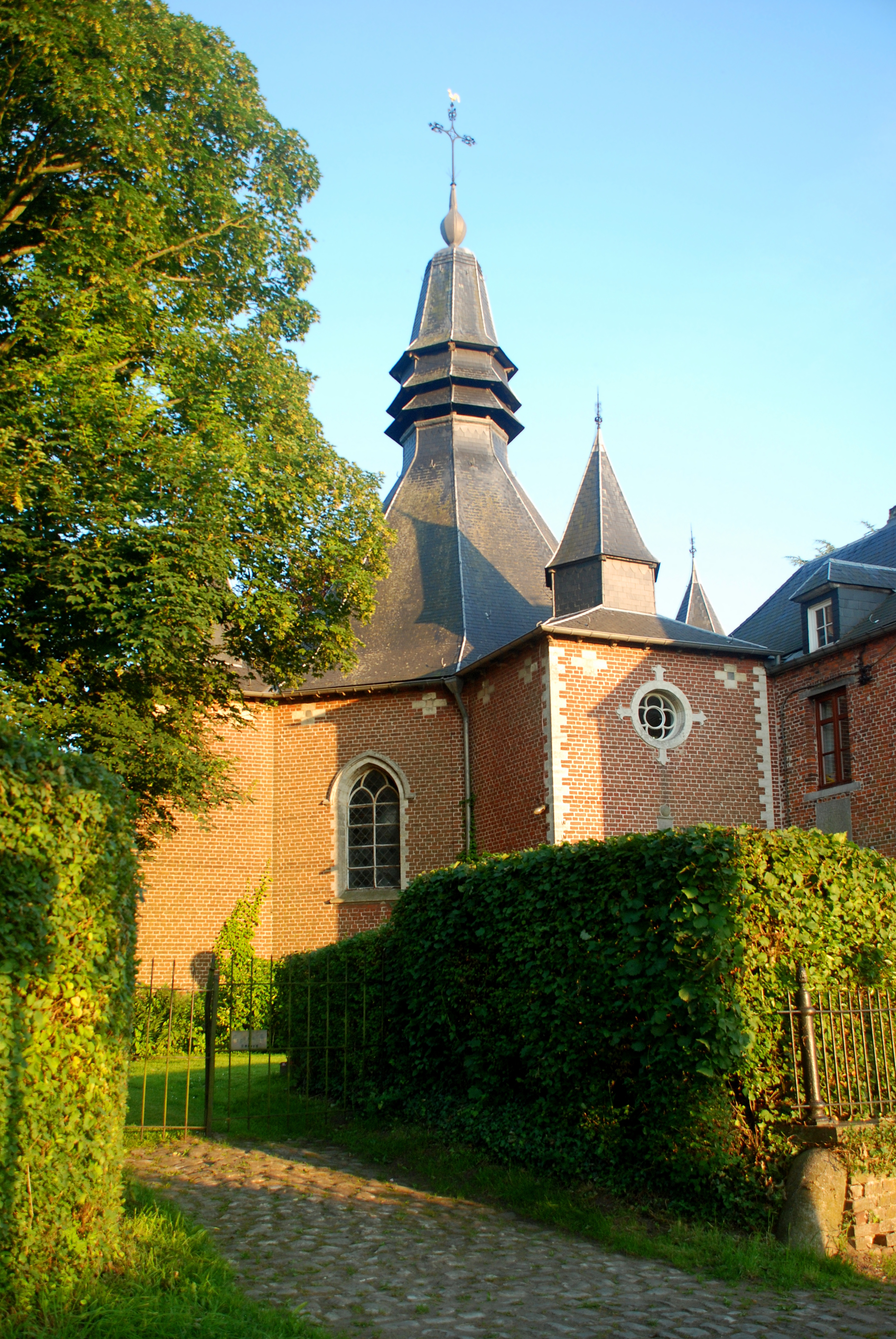 Belgique - Brabant wallon - Genappe - Loupoigne - Chapelle Notre-Dame de Foy